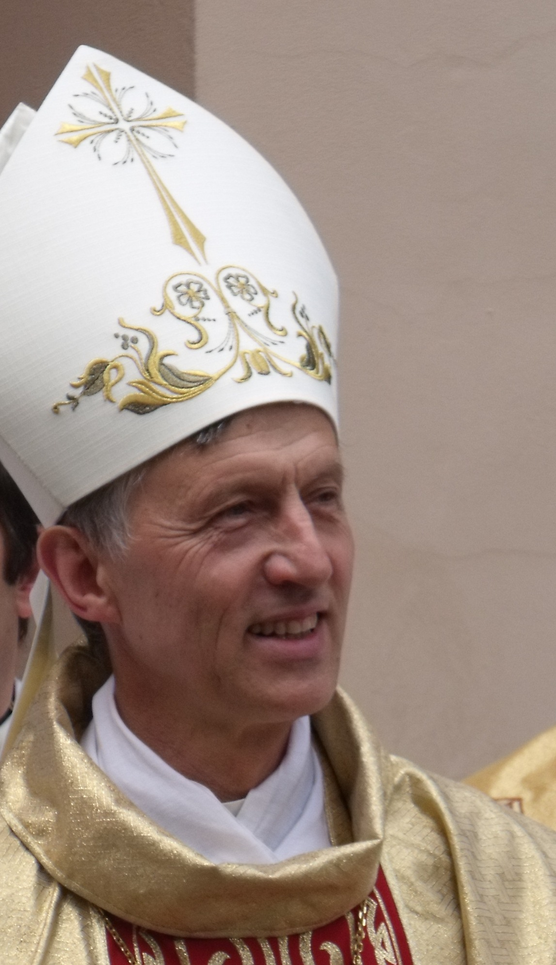 a Munkácsi római katolikus egyházmegye püspöke